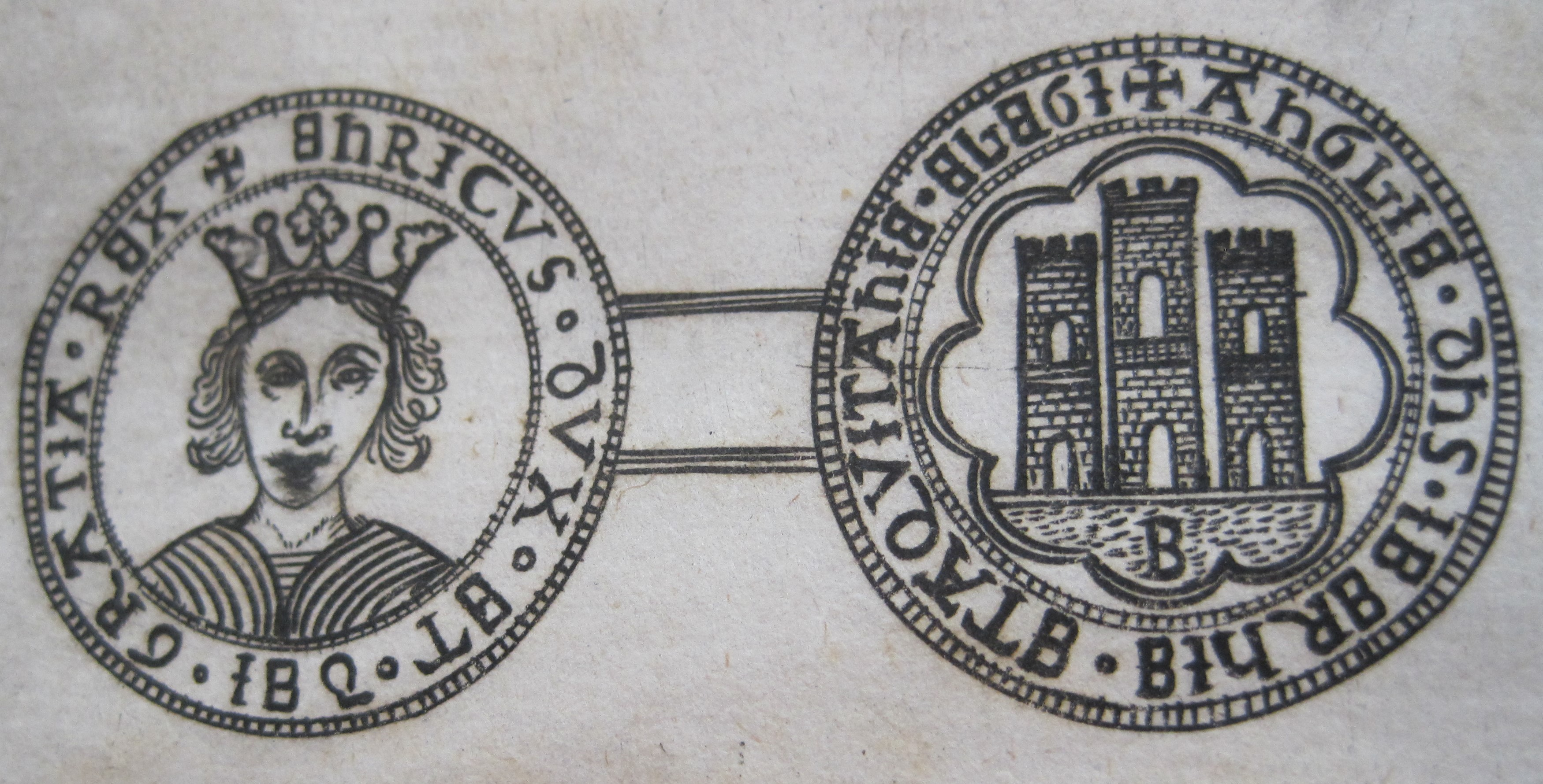 Sol Bourdales; extrait de Estienne Cleirac, L'usance du négoce ou commerce de la banque des lettres de change (1656) Bibliothèque de Bordeaux